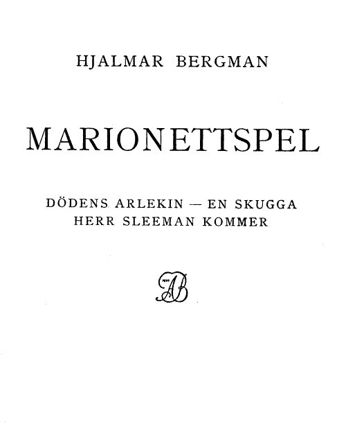 Titelsidan till Hjalmar Bergmans samlingsvolym Marionettspel 1917.